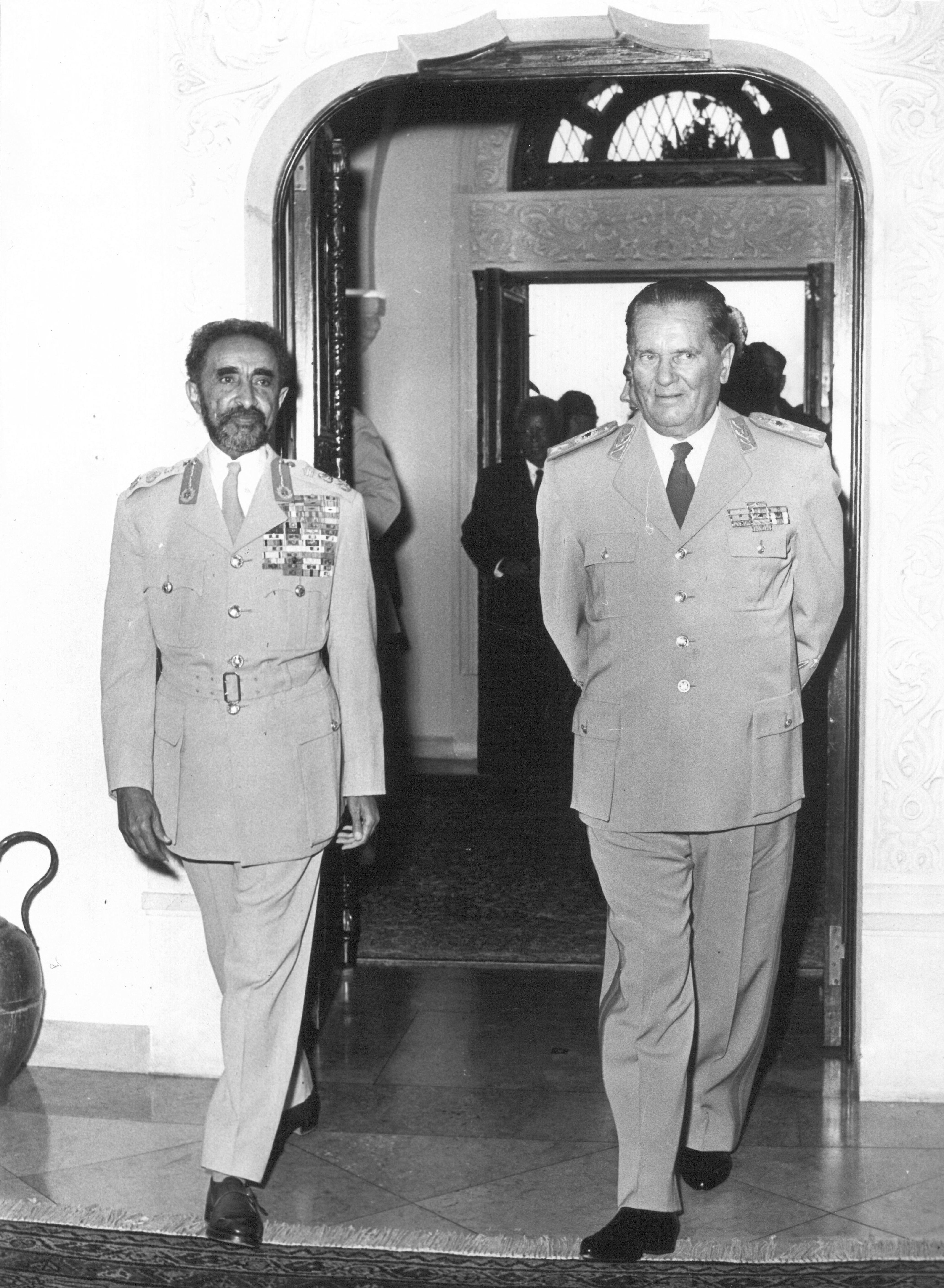 Car Haile Selasije i Josip Broz Tito, Beogad, 1963.Foto: Stevan Kragujević (po odobrenju kćerke Tanje Kragujević)